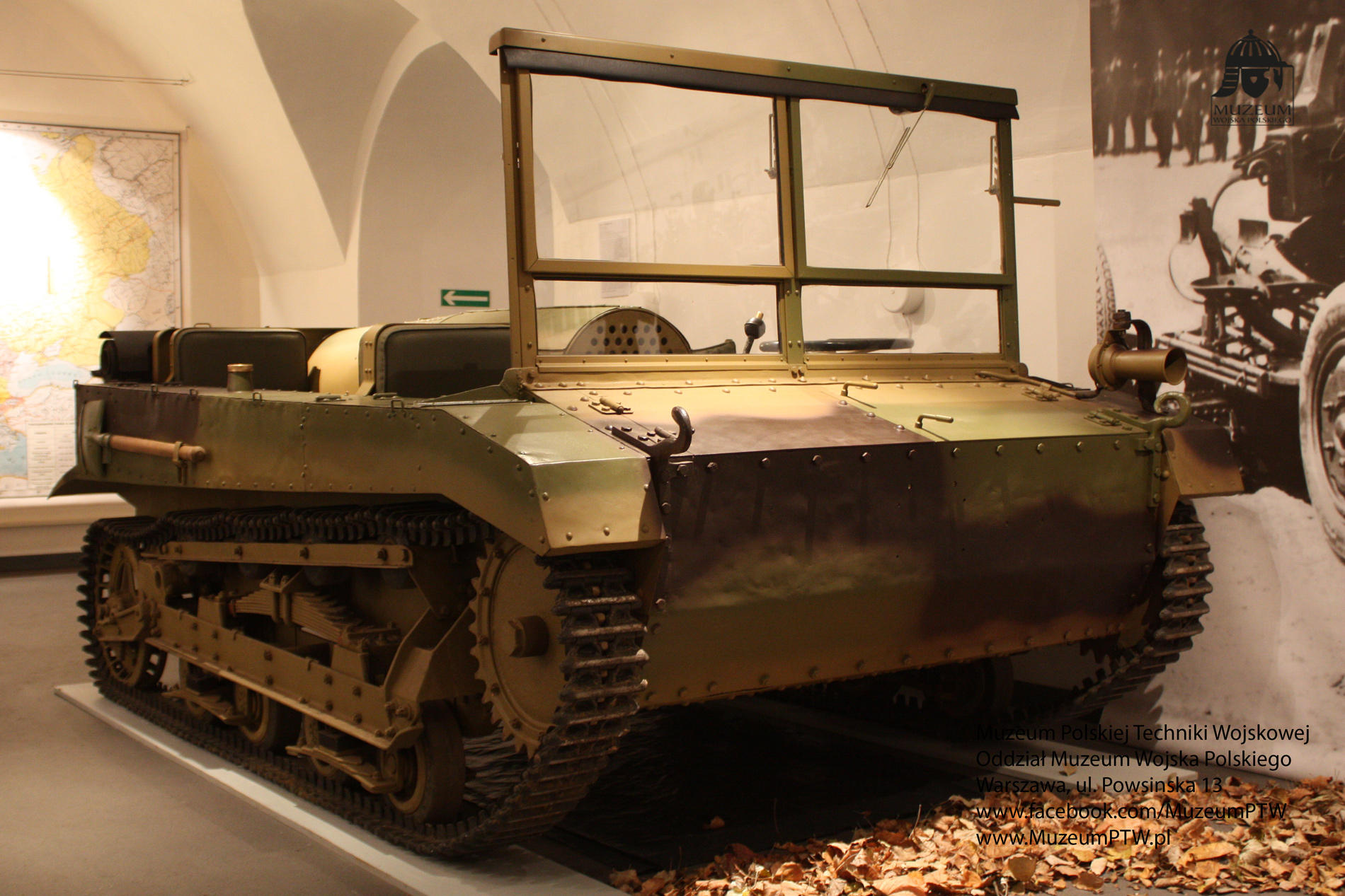 Ciągnik artyleryjski C2P odrestaurowany w 2013 roku, własność Pana Adama Rudnickiego. Wystawa "Wojna 1939. Zrobiliśmy to co do nas należało". Listopad 2014r w Muzeum Polskiej Techniki Wojskowej